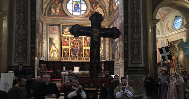 Traslazione della croce della croce di Arimberto di Intimiano dalla basilica di San Magno alla chiesa di San Martino, chiesa di riferimento della contrada vincitrice del Palio di Legnano 2016